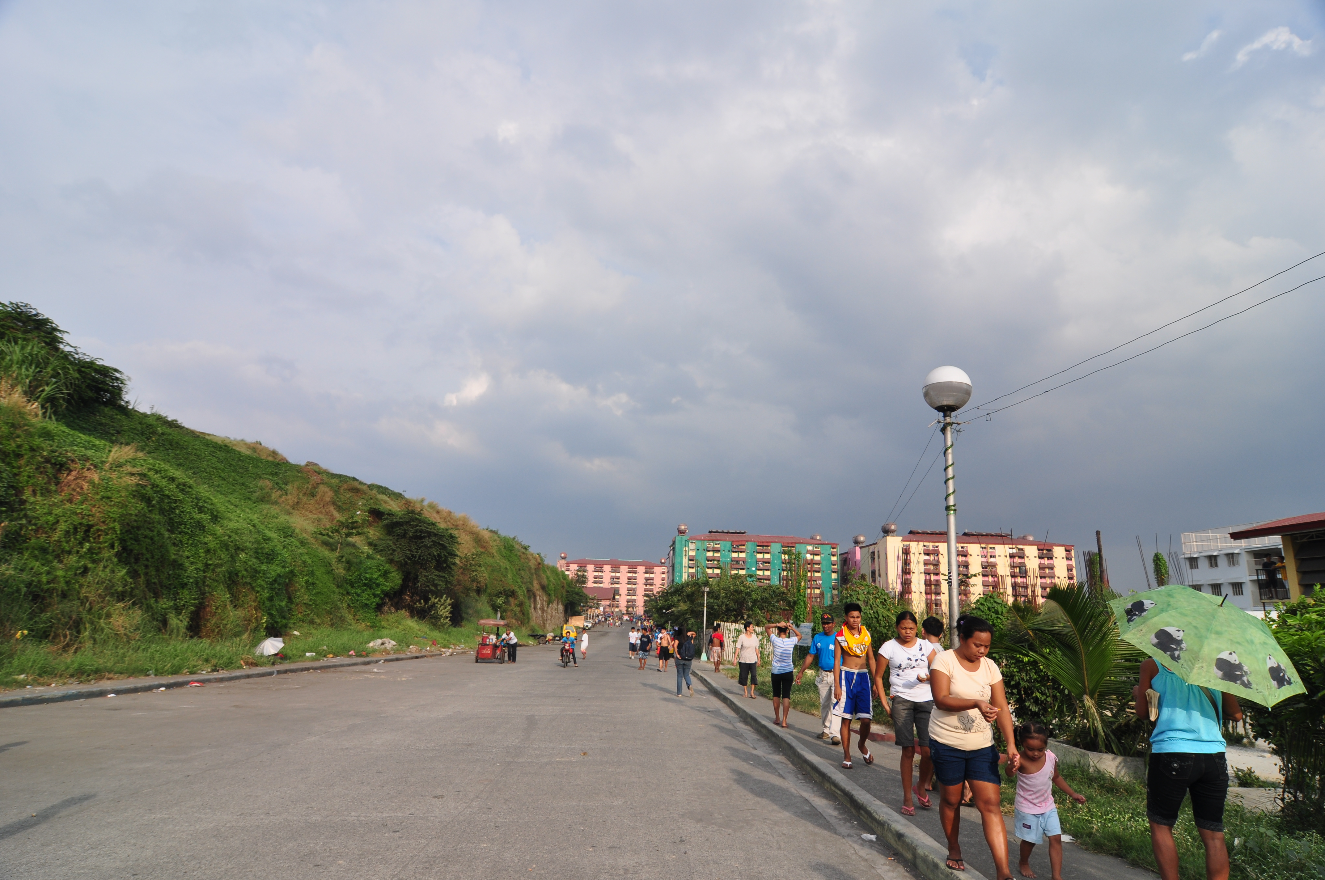 Smokey Mountain in Manila, Philippines